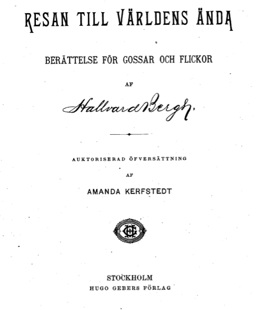 Titelsidan till Hallvard Berghs Resa till världens ända, i svenska översättning av Amanda Kerfstedt.